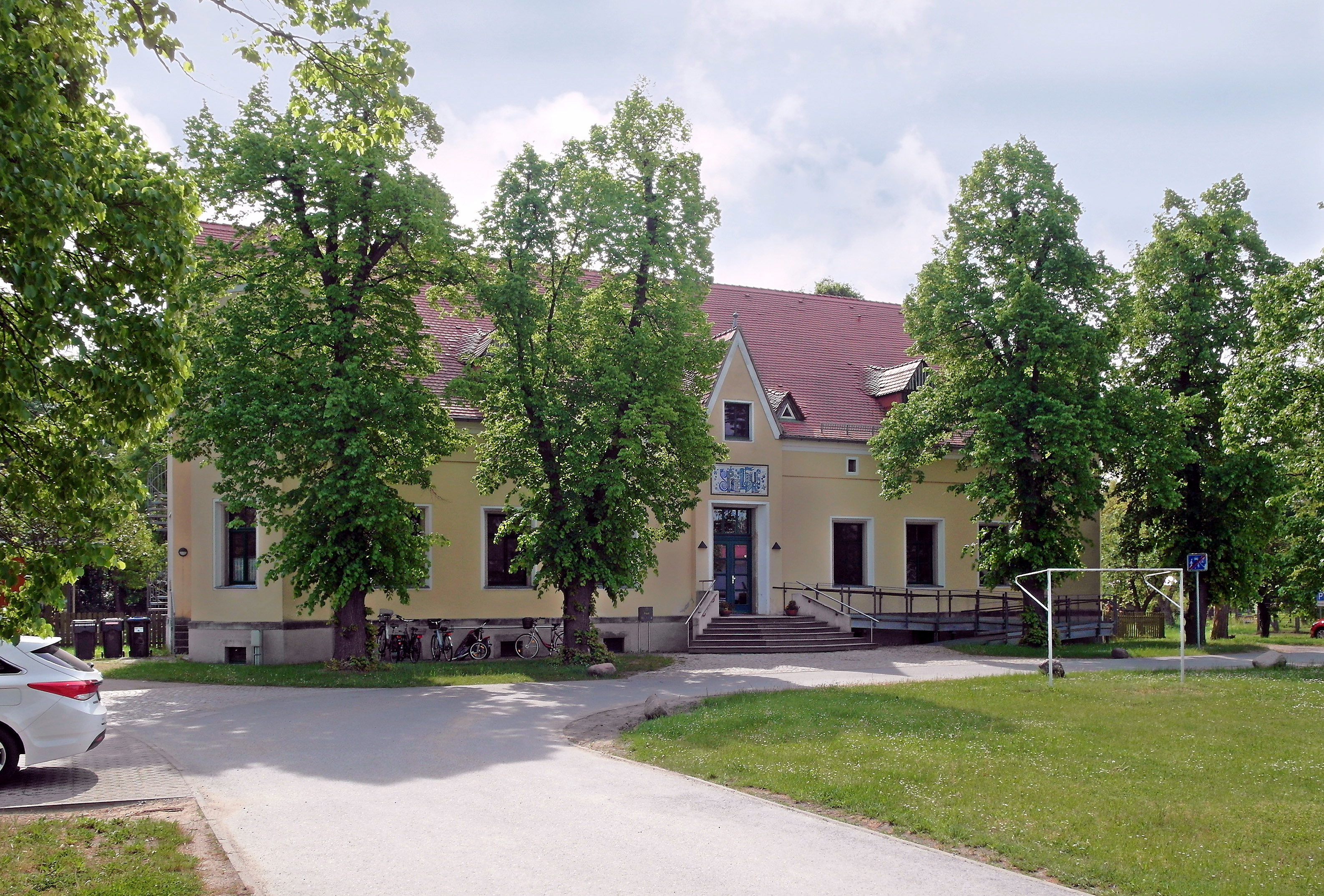 19.05.2016 01609 Streumen (Wülknitz), Dorfstraße 54 GMP: 51.354670,13.402652): Einstiges Herrenhaus, Hofseite. Es gehörte einst zu einem Vorwerk des Rittergutes Zabeltitz. Das heutige Haus wurde von einem bürgerlichen Pächter im ausgehenden 19. Jahrhundert errichtet. Nach der Bodenreform diente das Herrenhaus in der DDR als Schule, Sitz der LPG und als Kindergarten. Letzteres ist es noch heute und nennt sich "Spielburg". [SMA6079.JPG]20160519400DR.JPG(c)Blobelt